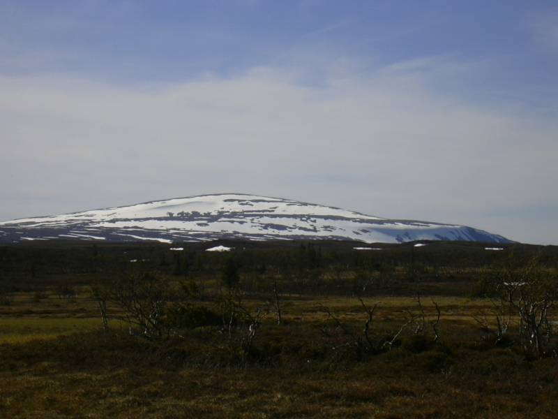 Der Hundshögen im Oviksfjäll in Jämtland, Schweden, gesehen von Süden; the top of the Hundshögen in the Oviksfjällen in Jämtland, Sweden, seen from the south